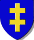 Escudo de Armas de la dinastía